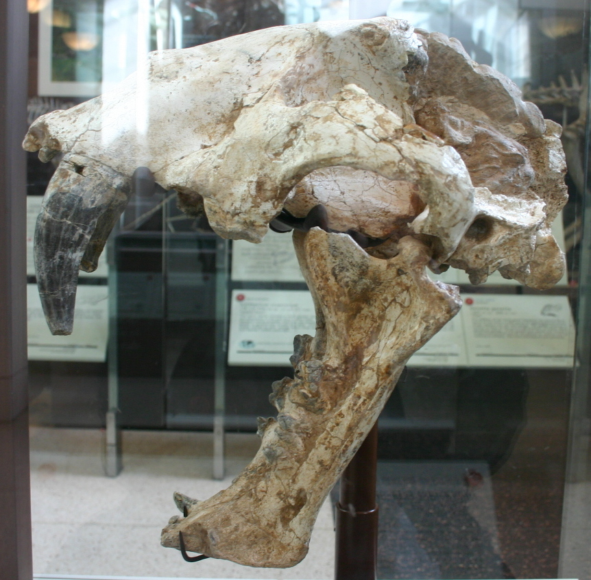 Machairodus palanderi skull